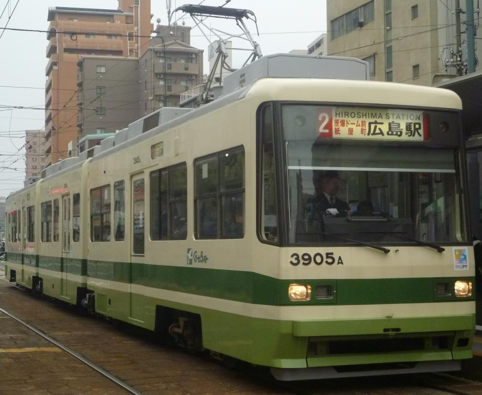 広電3905号